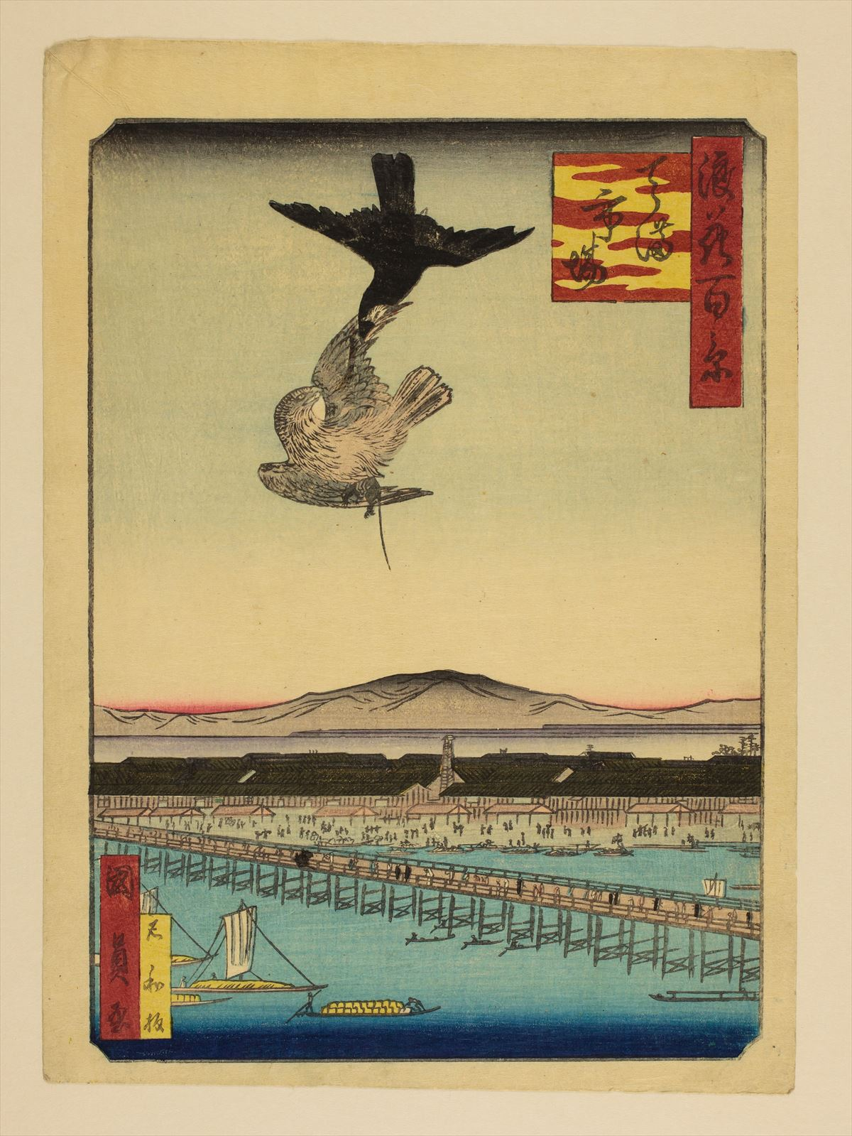 1800年代。歌川國員/画。浪花百景 102枚のうちの1枚。大阪市立中央図書館蔵。